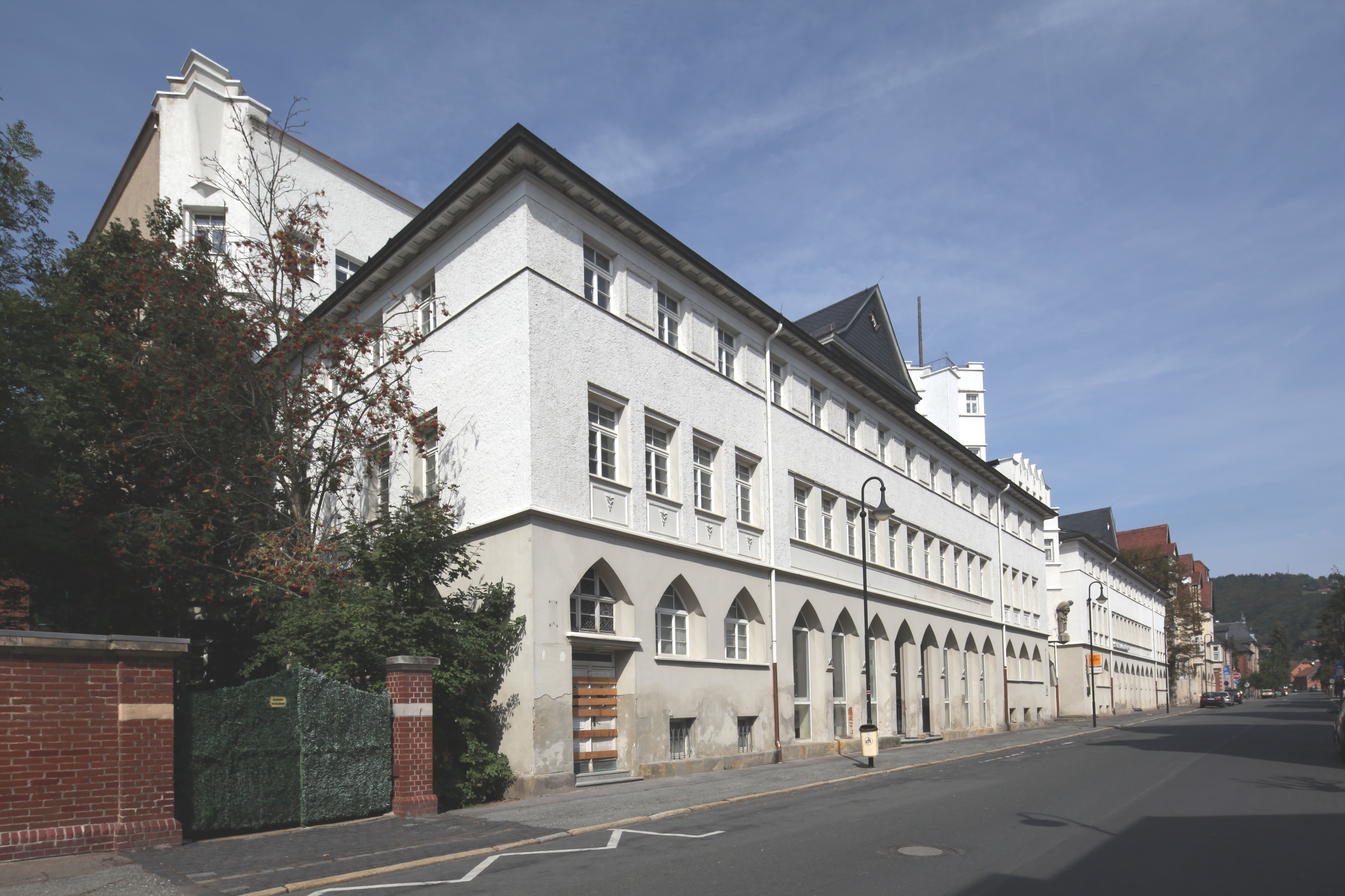 Ehem. Geschäftshaus S.S. Kresge & Co., 1921 von Franz Boxberger und Ernst Herbart, Erweiterung 1927/28 von Walter Buchholz, Sonneberg, Gustav-König-Straße 10